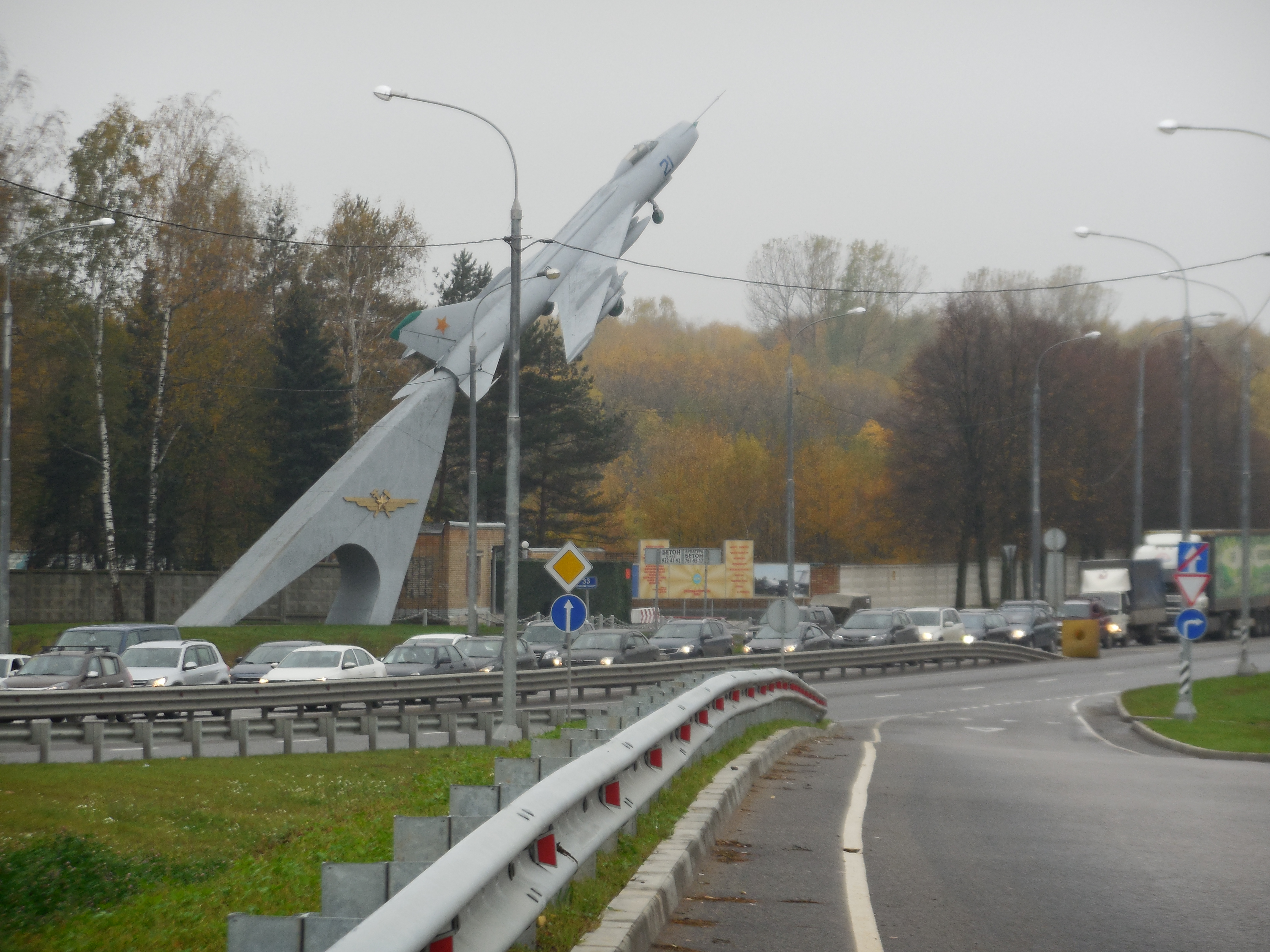 Вид на памятник Су -7 Б, на дальнем плане въезд А Чкаловского аэродрома (г. Щёлково Московской области)